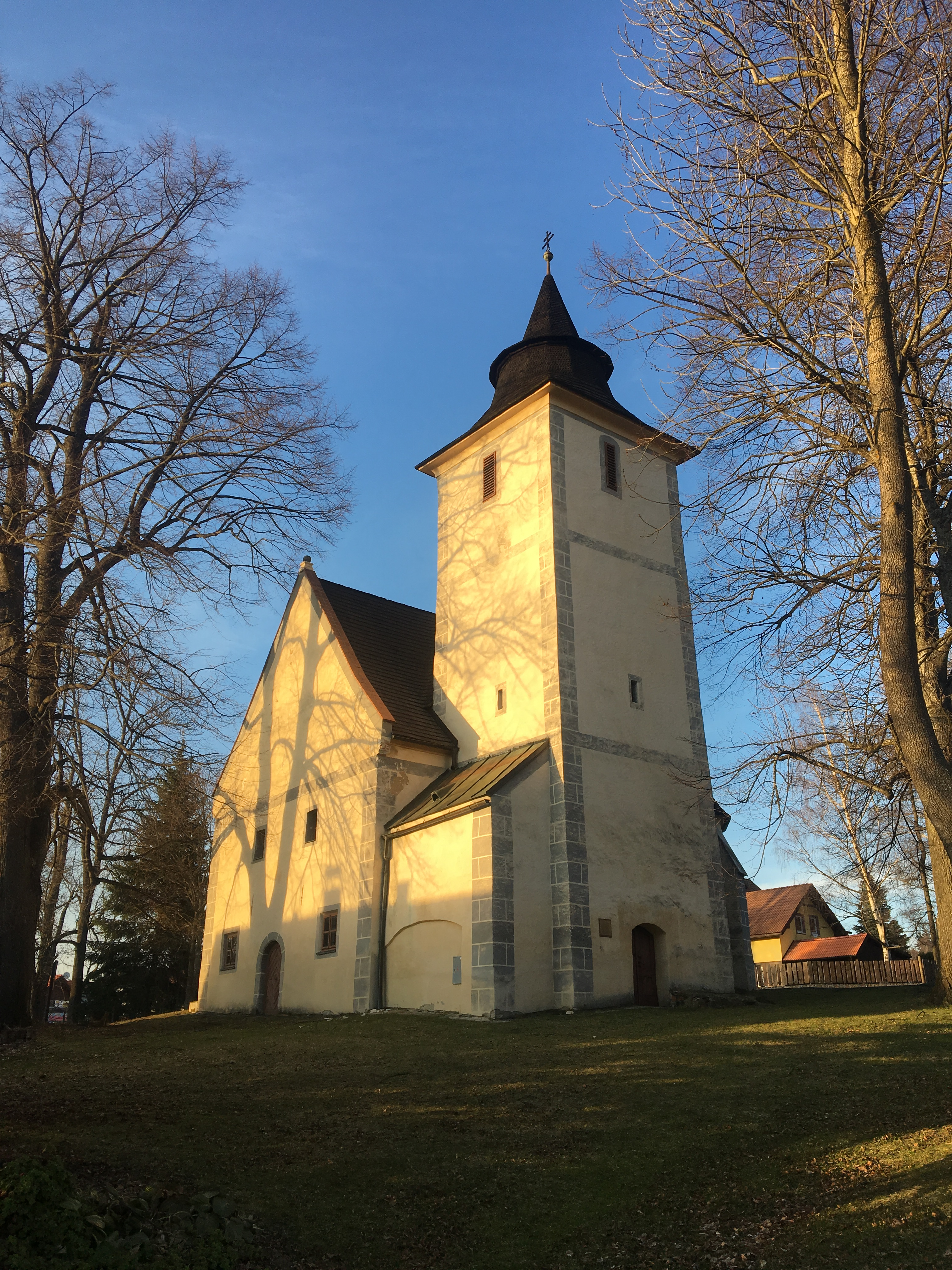 celkový pohled